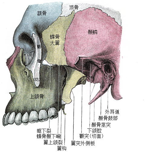 左颞下窝